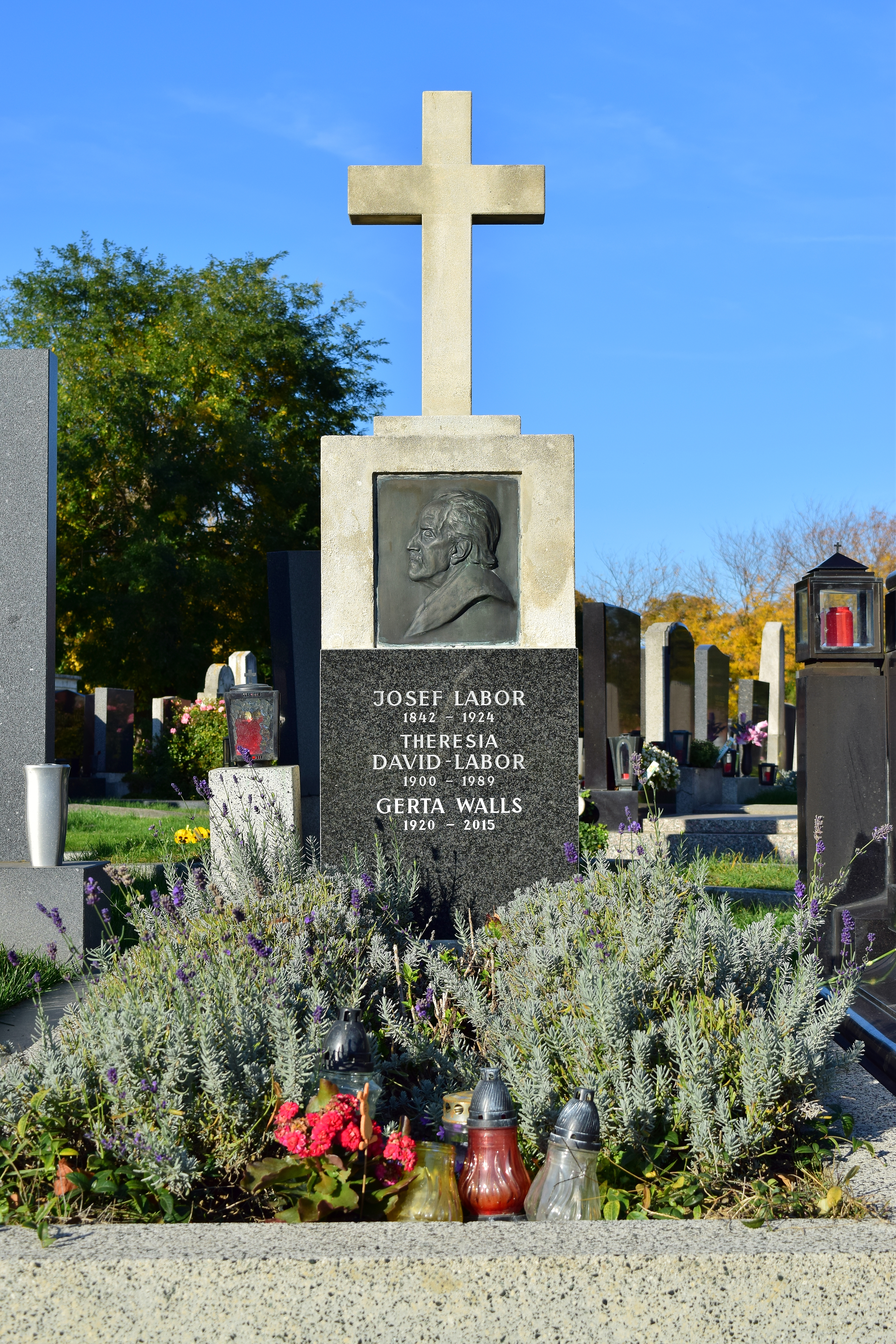 Ehrenhalber gewidmetes Grab von Josef Labor auf dem Wiener Zentralfriedhof, das Relief ist ein Werk von Georg Ehrlich.